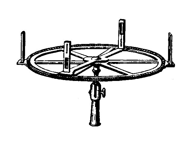 Fig. 87. — Mesure des distances angulaires des étoiles à l’aide de pinnules.